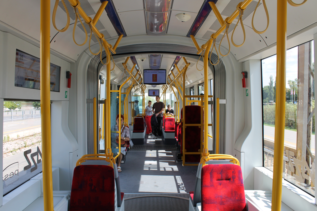 Wnętrze tramwaju Pesa Jazz 134N #3801.